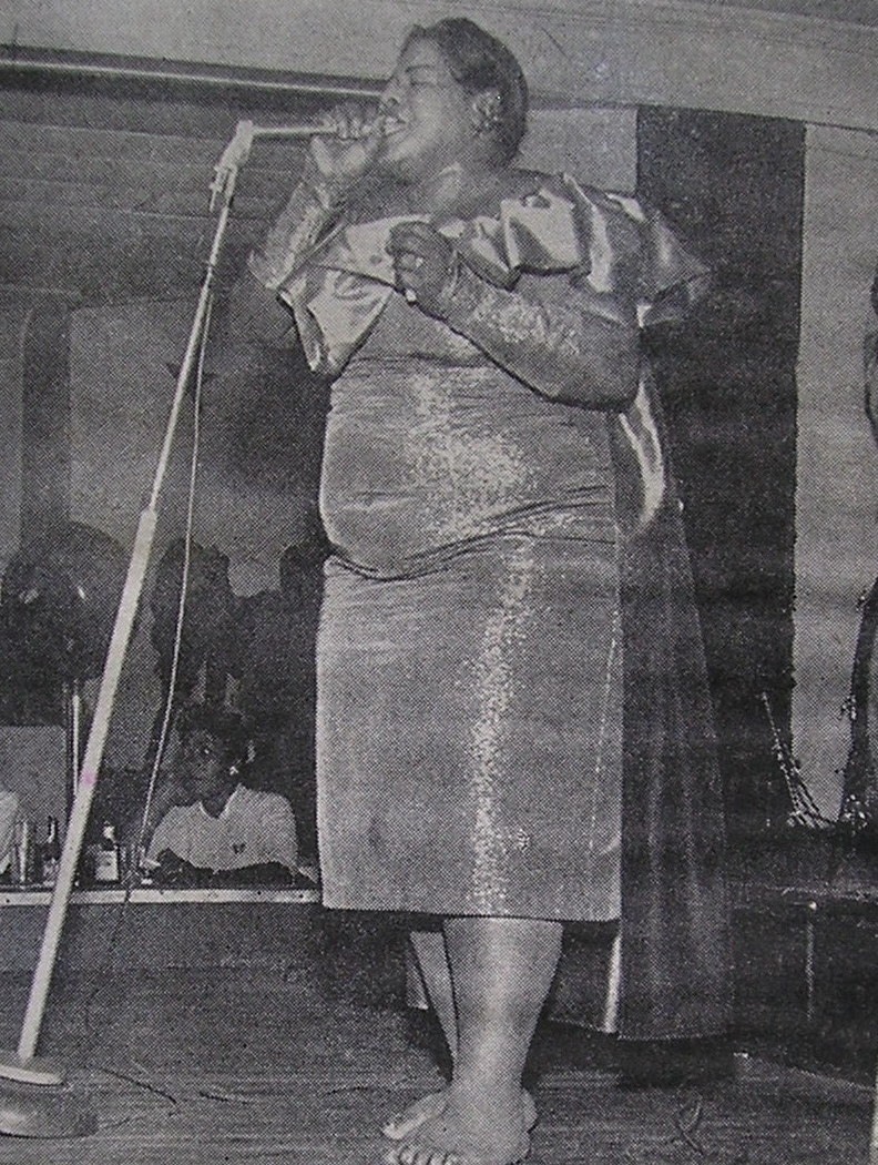 Big Maybelle, Jet magazine 1956